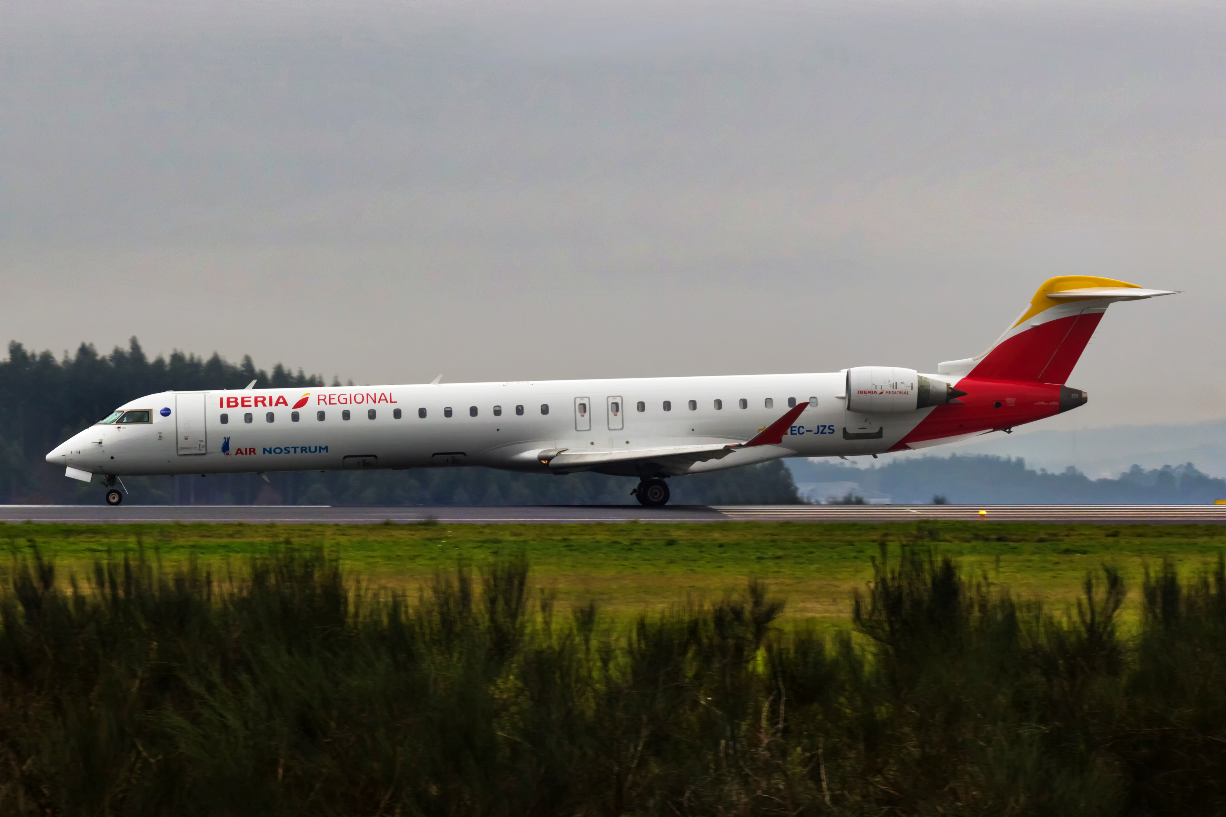 CRJ900 de Air Nostrum despegando do aeroporto de Santiago de Compostela.